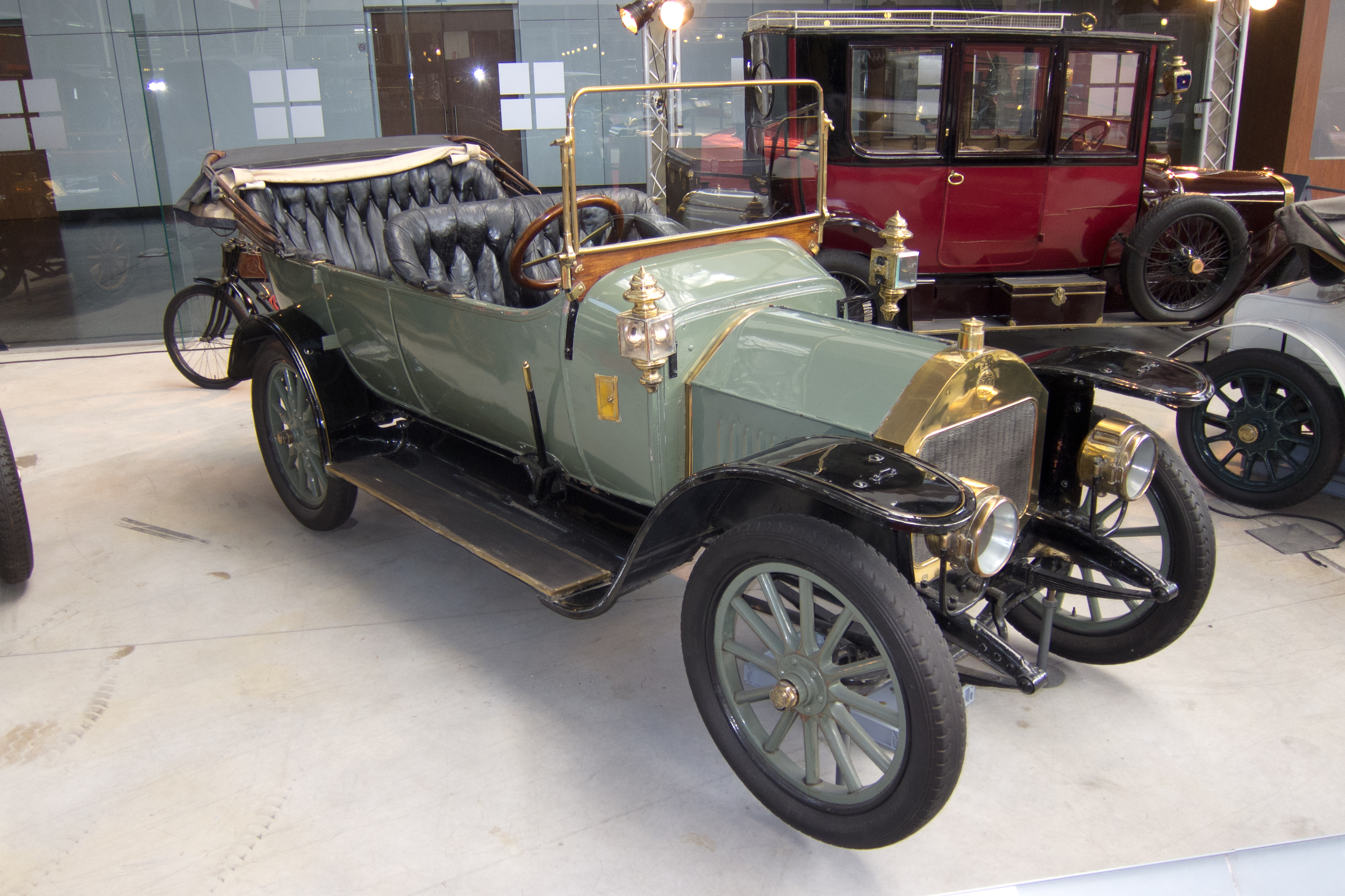 Darracq 15 CV (1911) at Autoworld Brussels, Belgium, 2011